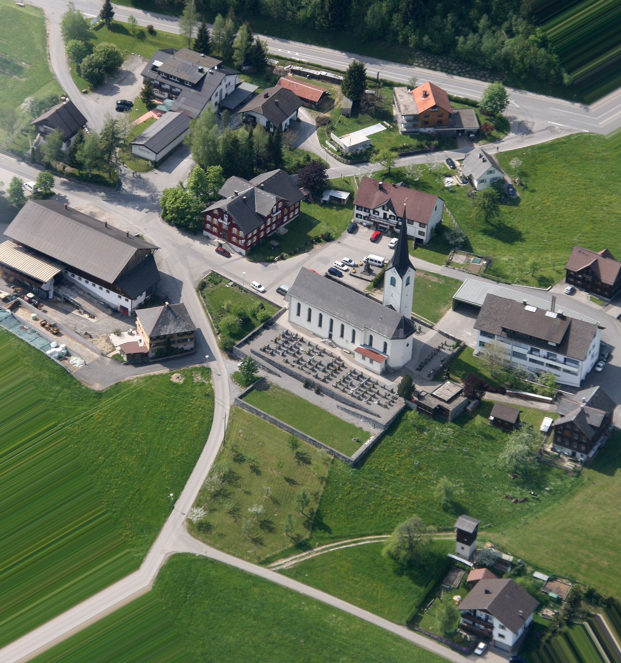 Luftaufnahme vom Kirchdorf in Langen bei Bregenz, aufgenommen während eines Fluges mit einer Propellermaschine des Types: D-EJCR Robin DR400-180R. Flughöhe ca. 1800m